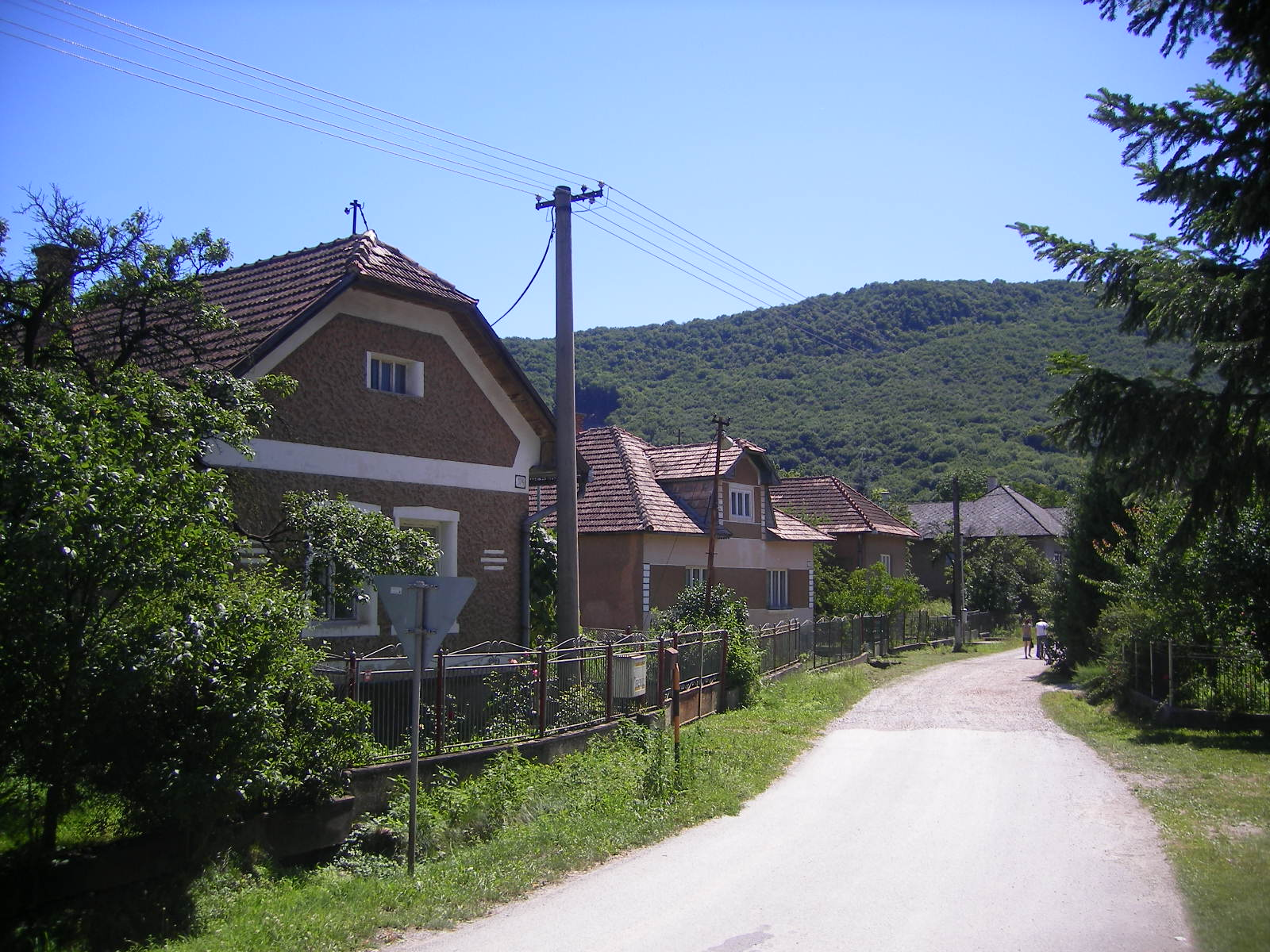 Várhosszúrét - utcakép